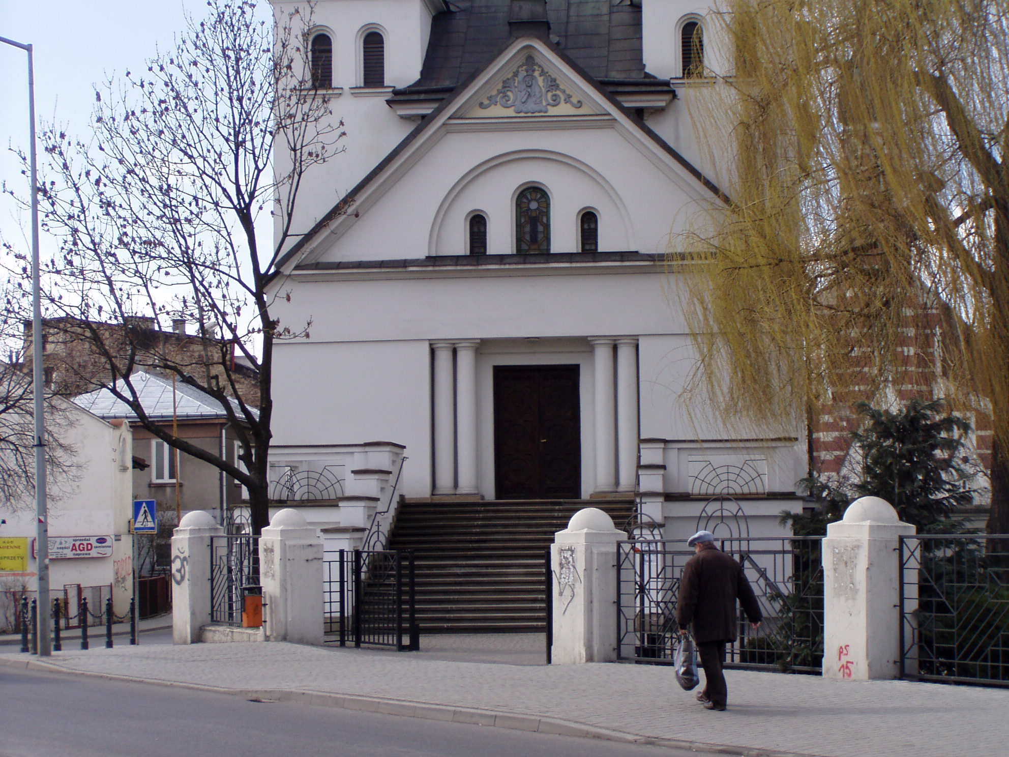 Klasztor Zakonu Bazyliańskiego Świętego Jozafata p.w. Współcierpienia Najświętszej Bogurodzicy w Przemyślu